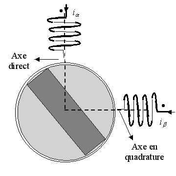 dessin réalisé pour l'article commande vectorielle par